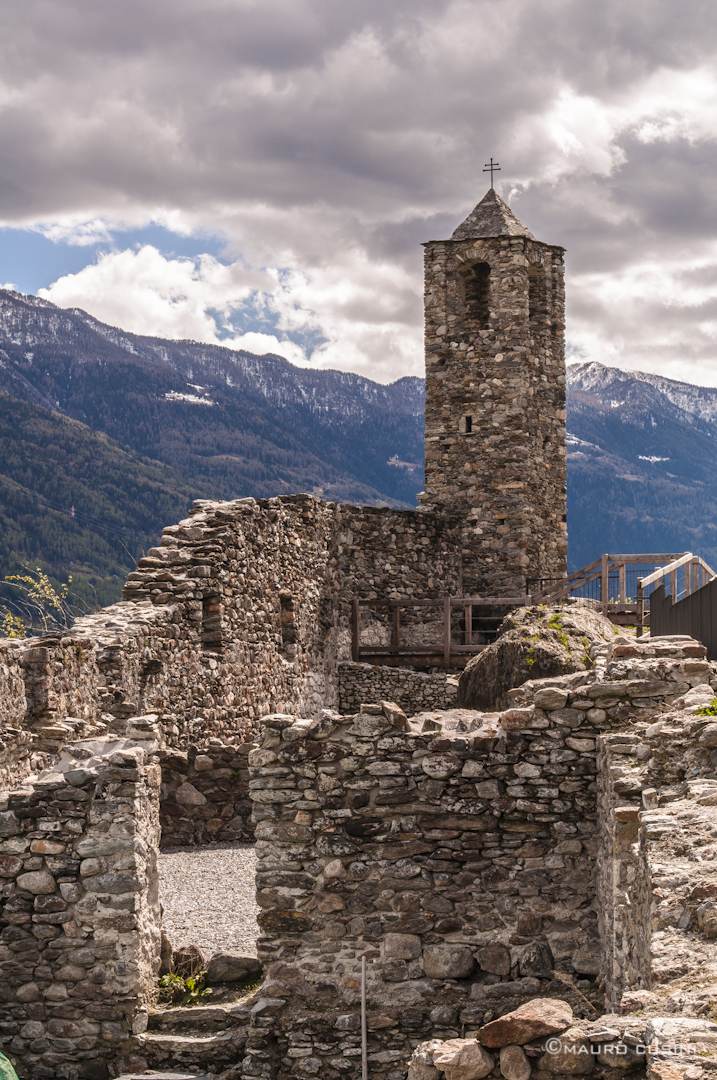 Parco delle Incisioni rupestri di Grosio - MIBAC This is a photo of a monument which is part of cultural heritage of Italy.